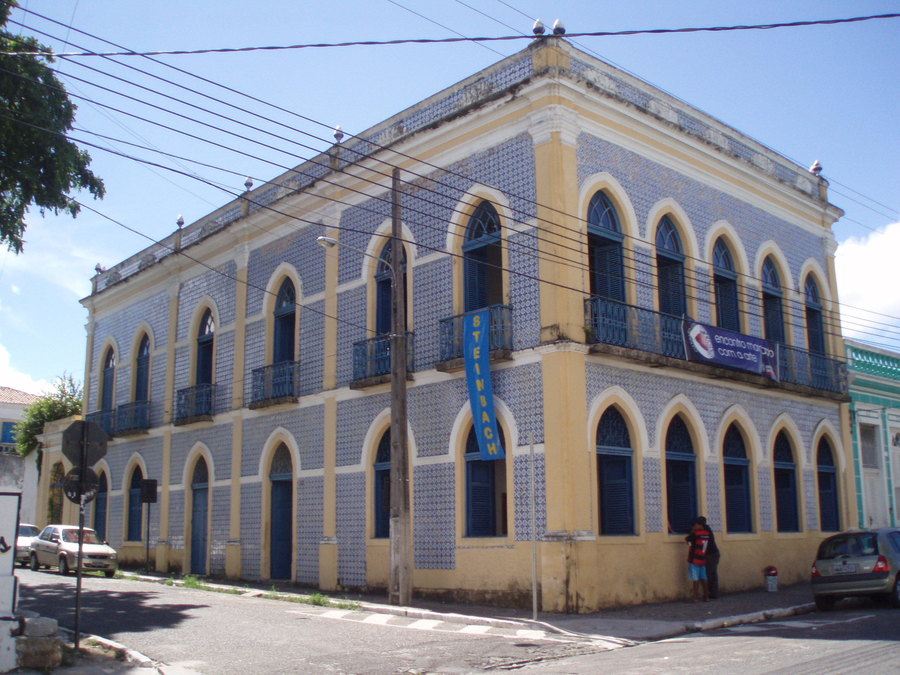 Brasil, João Pessoa, Casarão dos Azulejos na praça dom Adauto